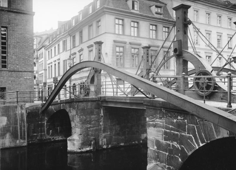 Berlin Märkisches Museum und Umgebung. Die Jungfernbrücke (eine Zugbrücke) Aufnahme 1929